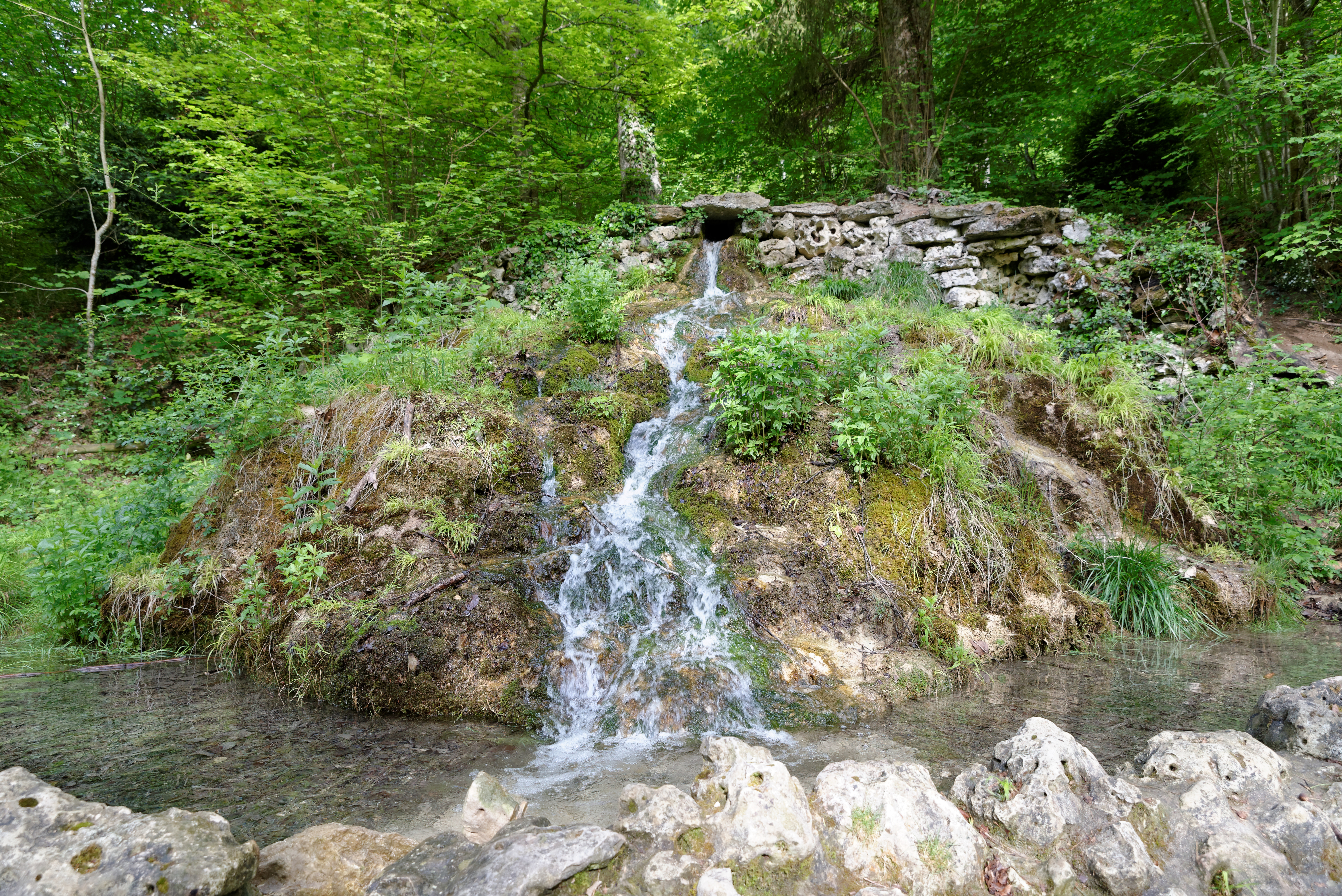 Site de la "Fontaine de Jouvence". (Réserve naturelle régionale du Val-Suzon) (Côte d'or, Bourgogne, France).